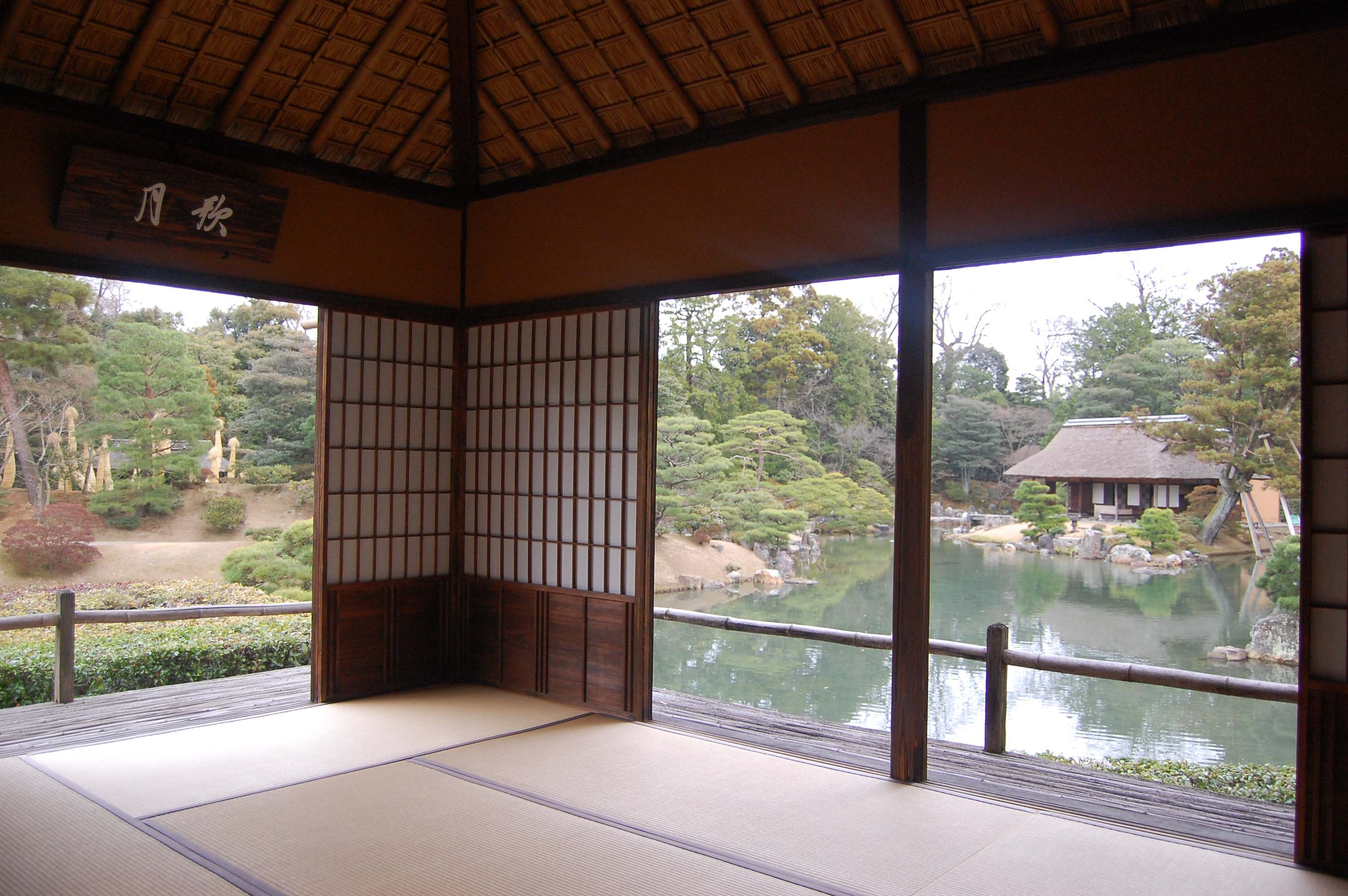 Geppa-ro tea pavillion